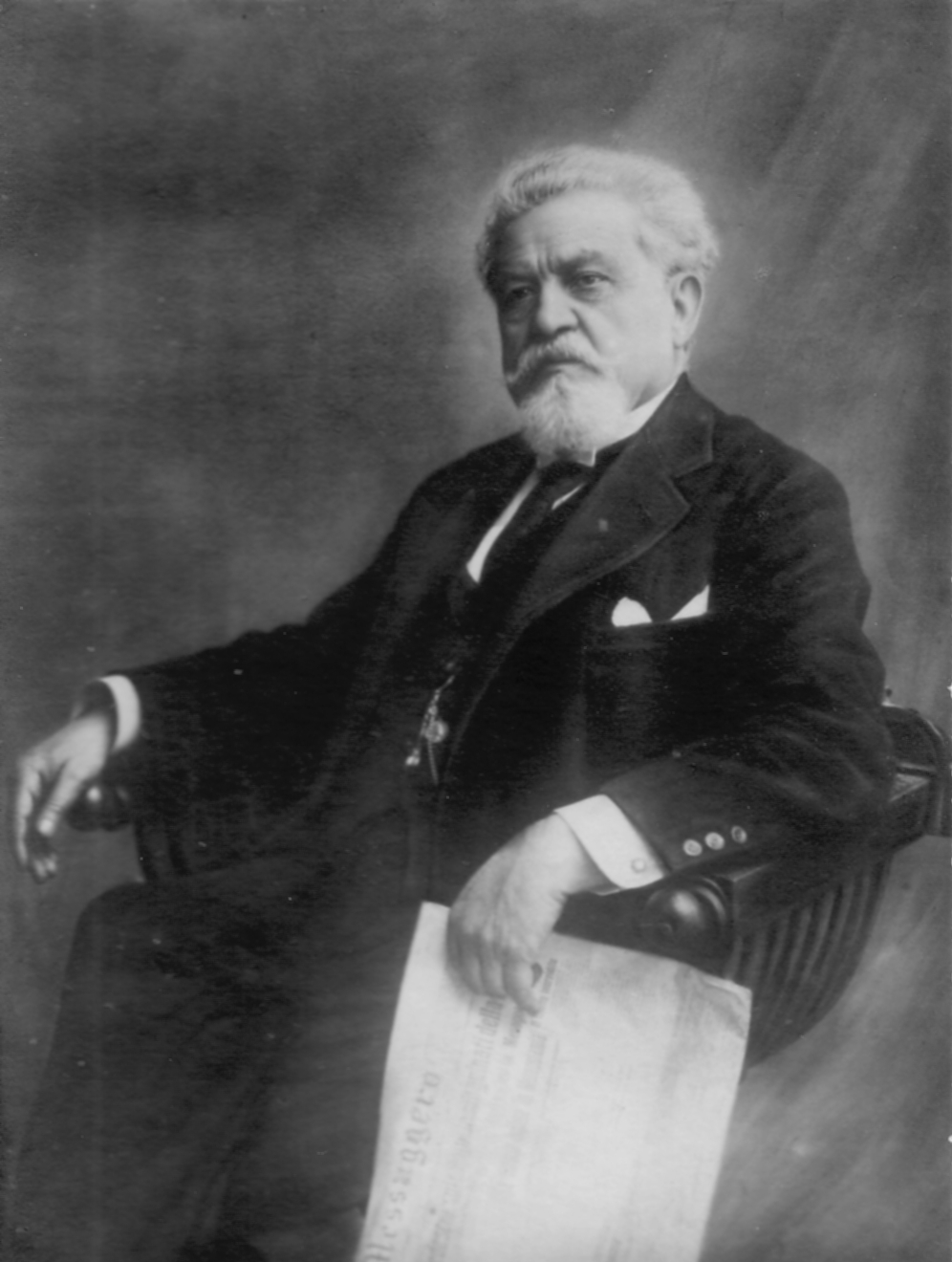 Foto di Edoardo Pantano